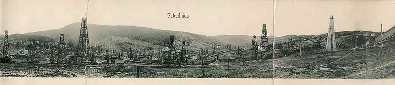 Панорама Сходницы